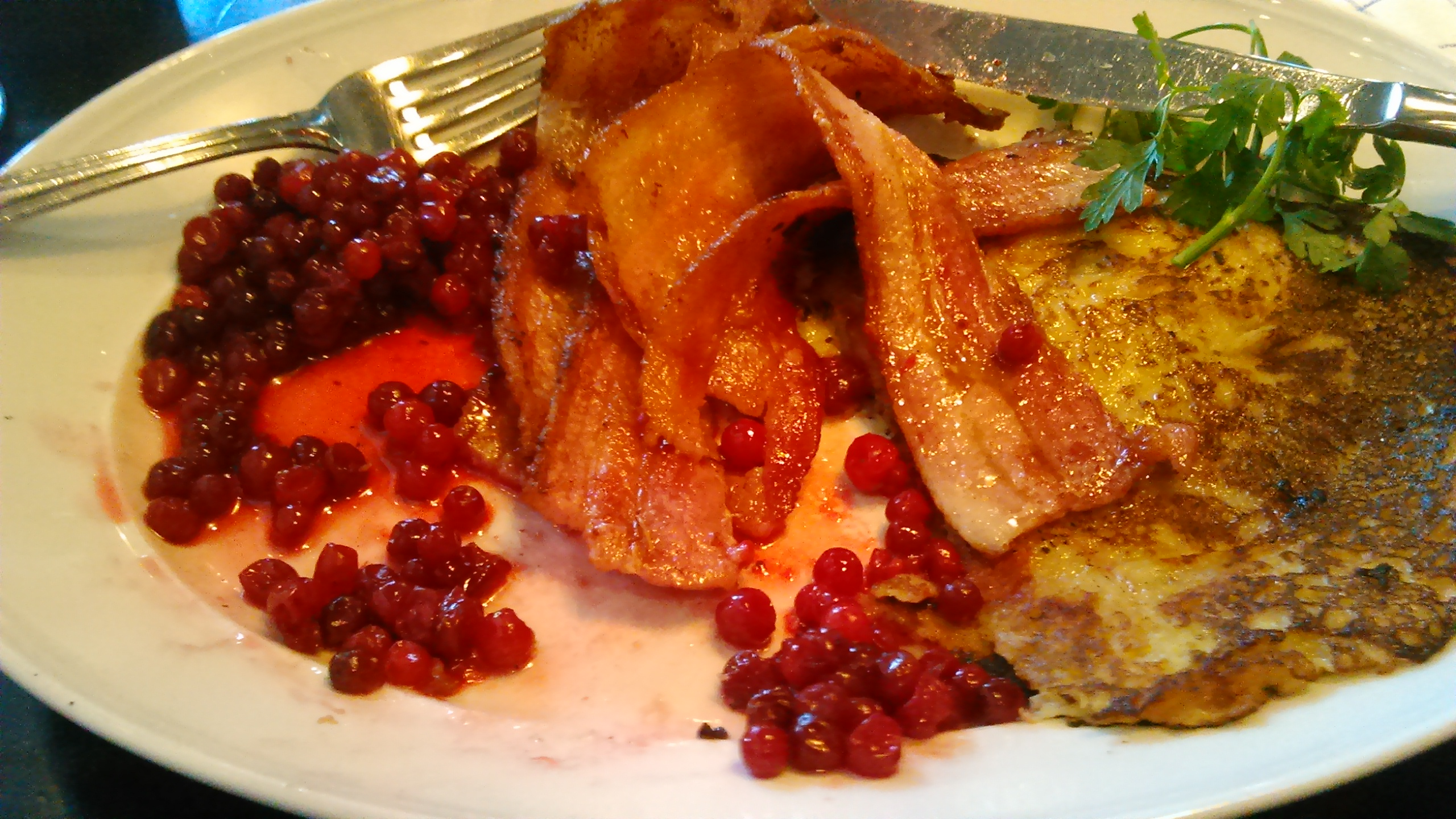 Raggmunk, Sweden